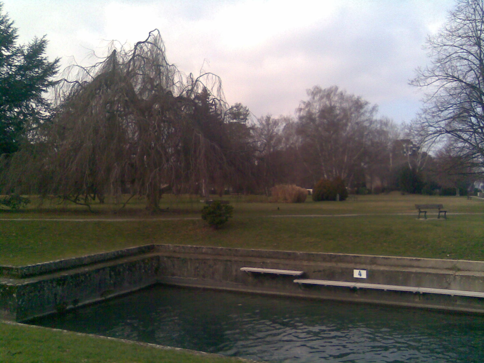 Le parc du Mottay à Amphion-les-bains.